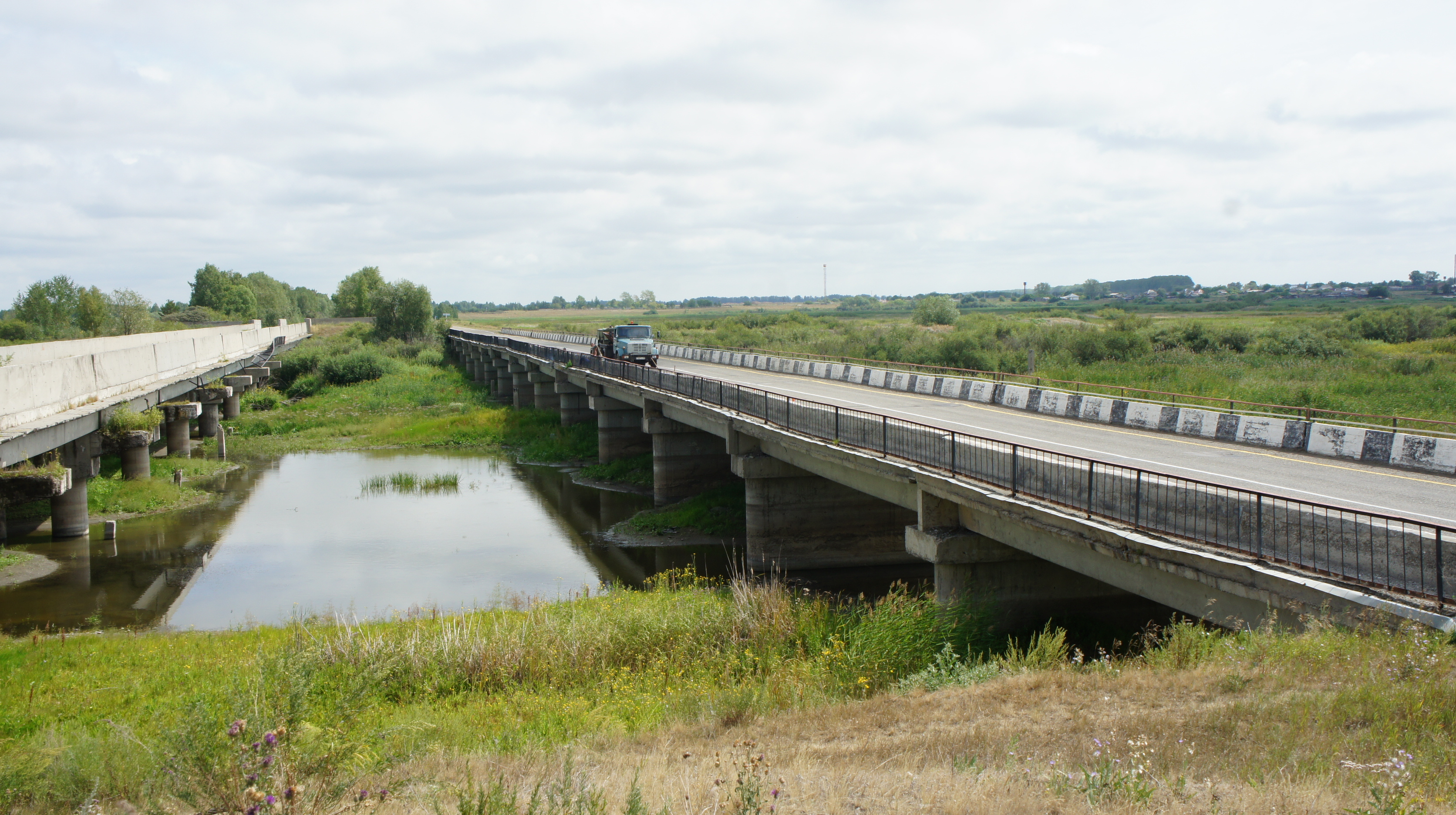 Река Кулунда в районе села Андроново. Пересечение с водоводом Кулундинского магистрального канала.